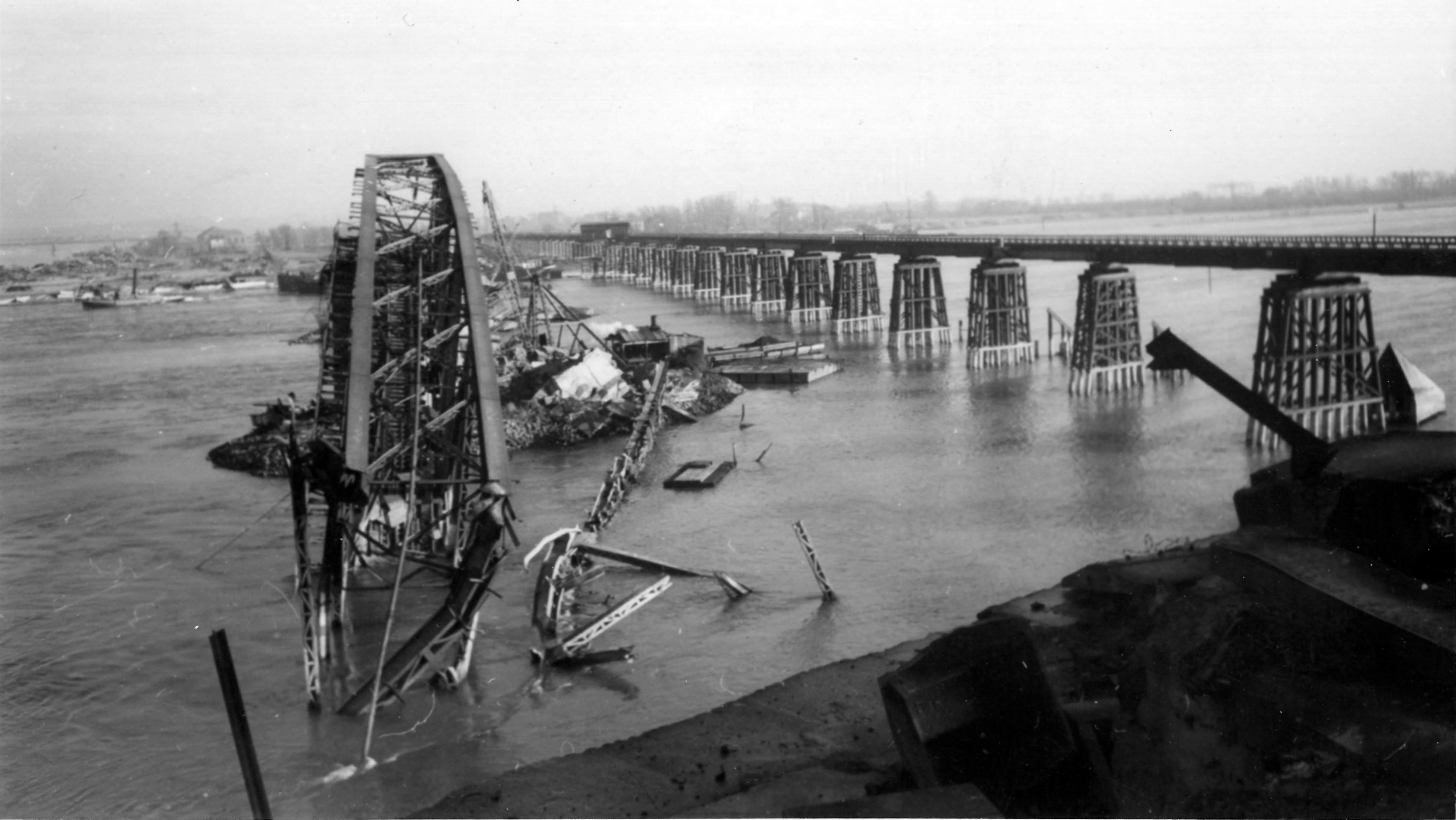 Im Vordergrund die Eisenbahnüberführung über den Rhein (Mainzer Südbrücke), rechts im Bild die als Behelfsbrücke errichtete Marshallbrücke.